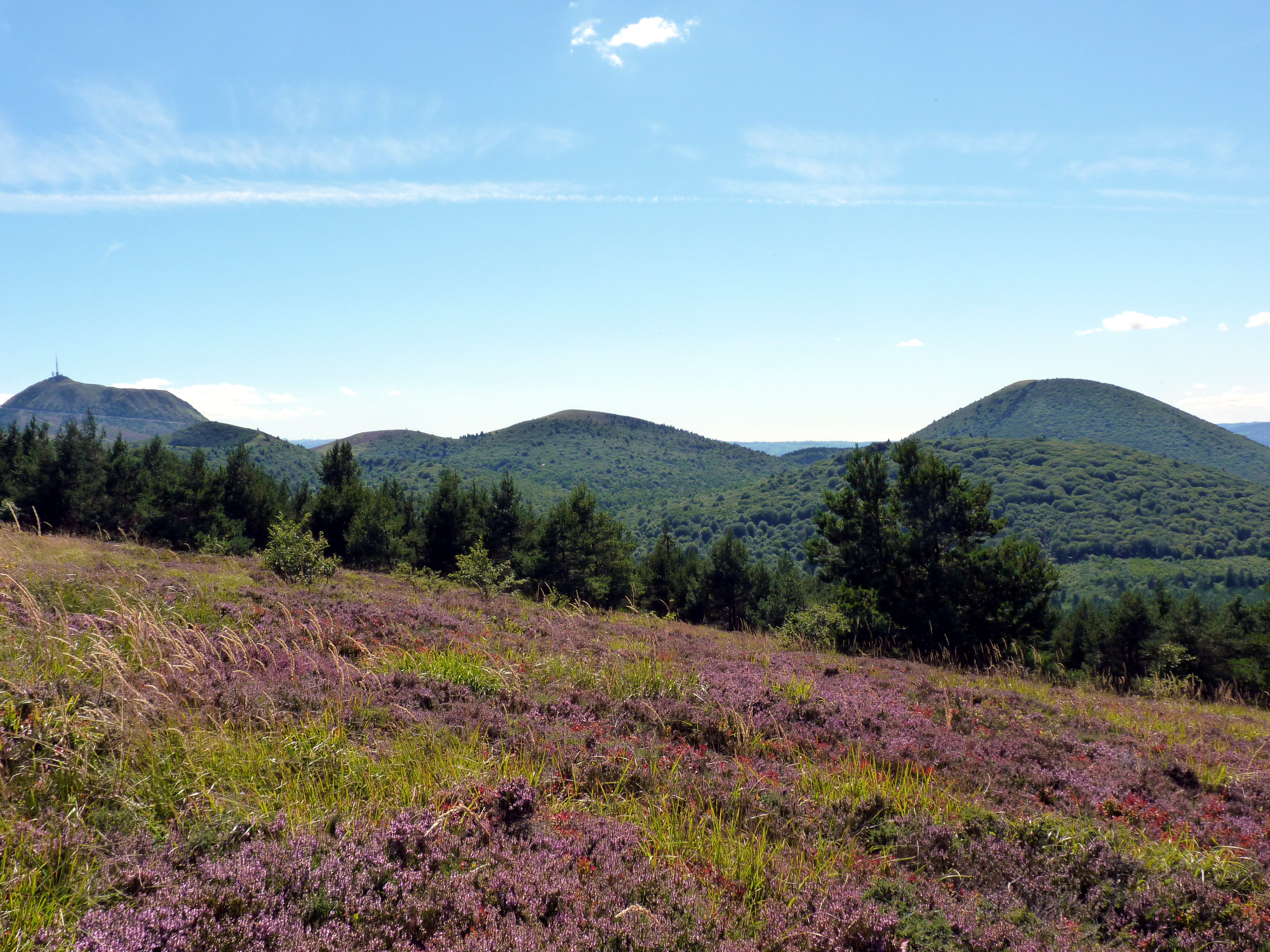 Depuis le Grand Sarcoui, une vue des Puys (de la gauche vers la droite : le Puy de Dôme - Petit et Grand Suchet et le Puy de Côme).